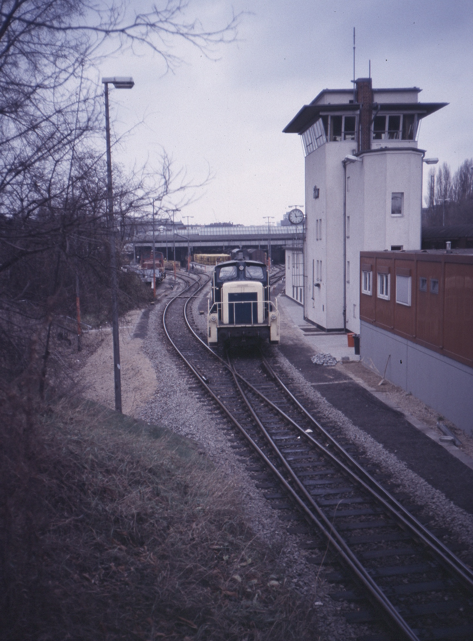 Postbahnhof Berlin Luckenwalder Straße und Stellwerk Plw